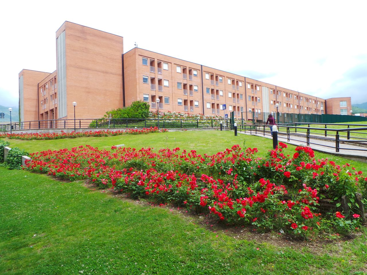 Residenze dell'UNISA